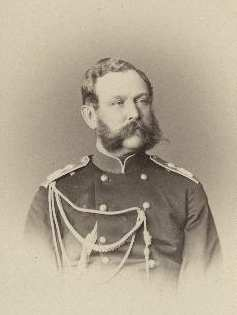 Russian General of Cavalry Pontus Brevern De la Gardie (1814-1890)